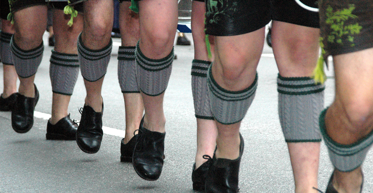 Wadlstrümpfe auf - Wadenstrümpfe als Teil einer Bayerischen Tracht